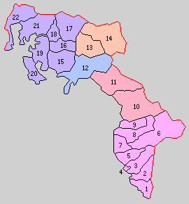 長崎県東彼杵郡の町村制時点の町村。